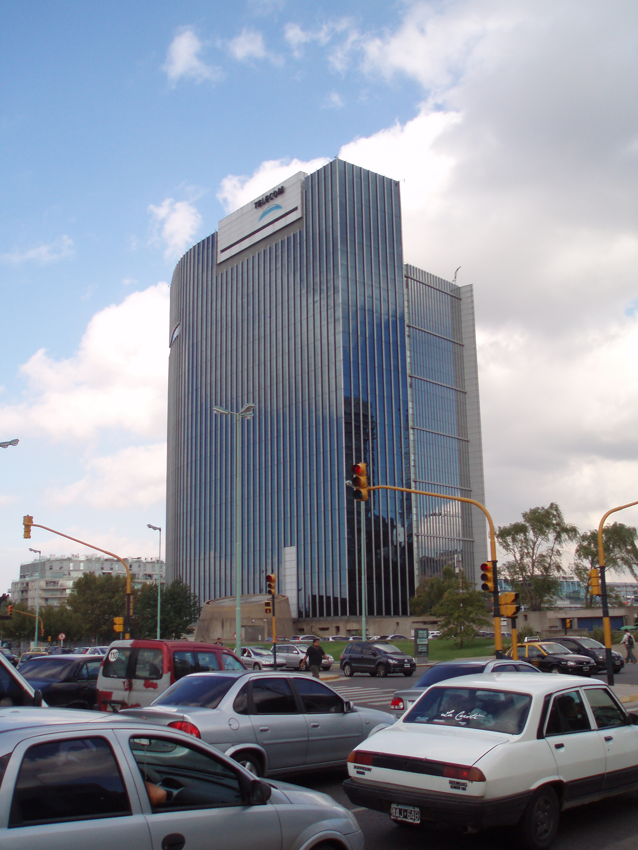 Edificio Telecom desde Av. Moreau de Justo, Buenos Aires.